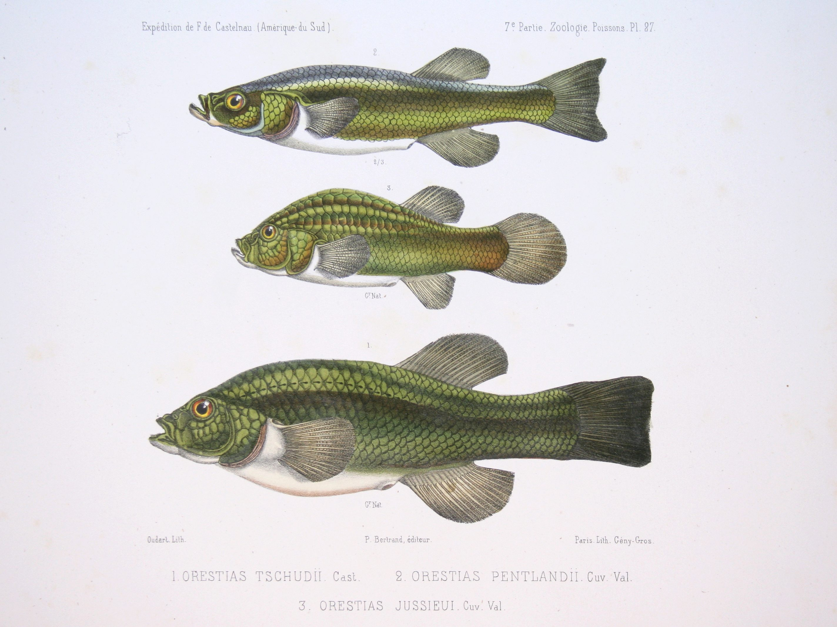 From top to bottom: Orestias pentlandii Orestias jussieui = Orestias jussiei Orestias tschudii